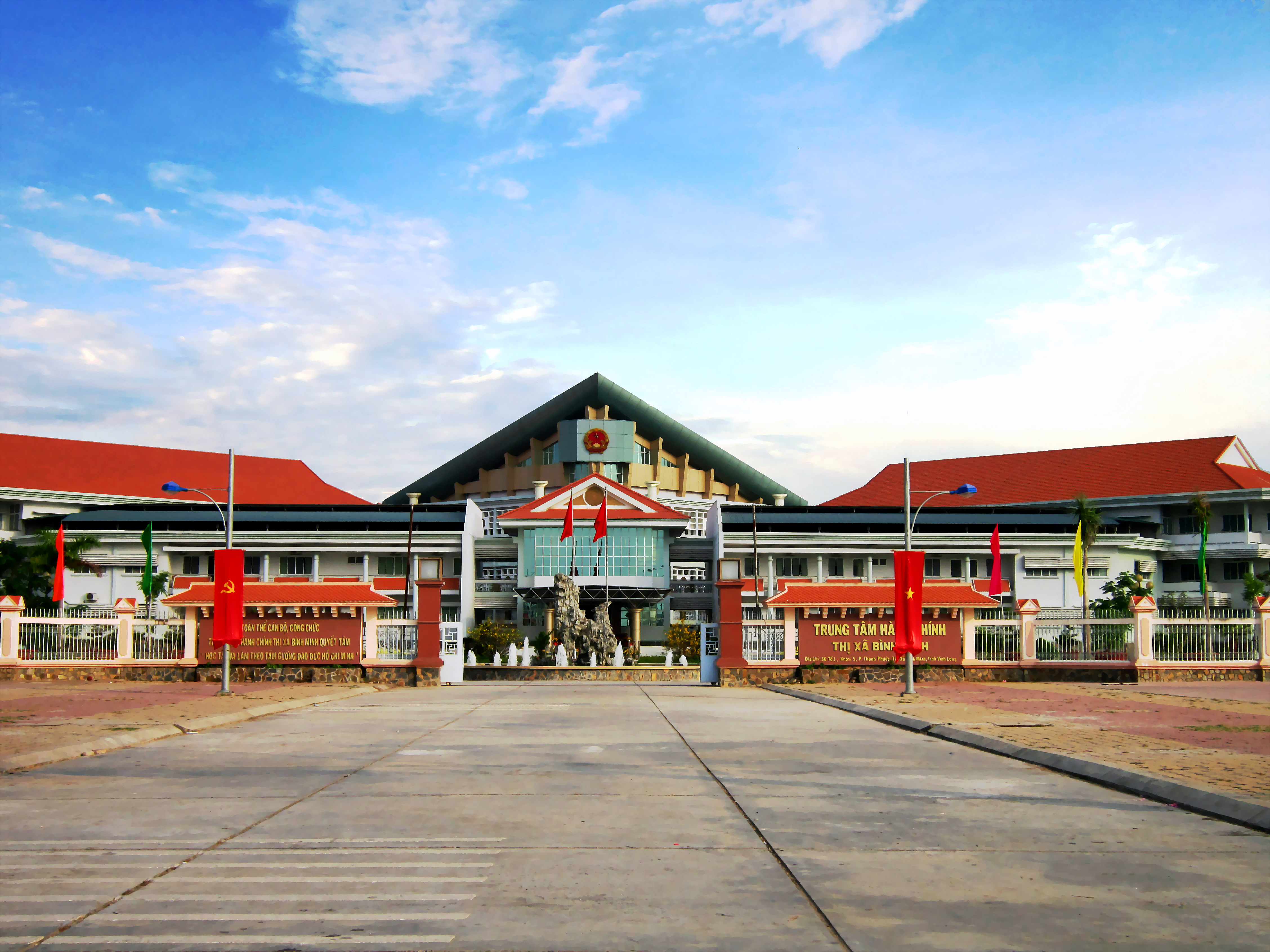 Trung tâm hành chính thị xã Bình Minh, tỉnh Vĩnh Long, Việt Nam.